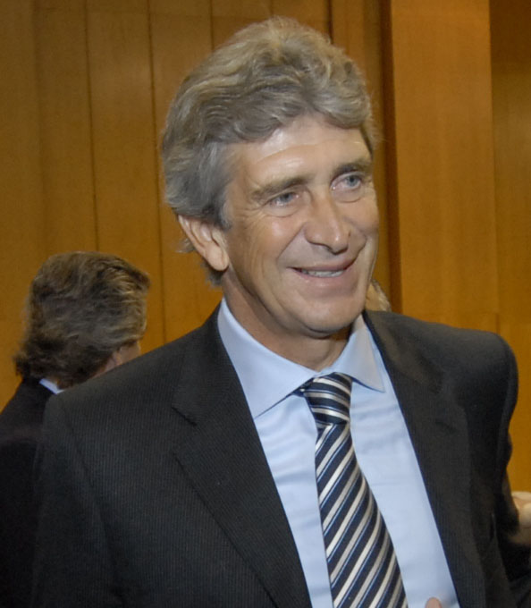 Manuel Luis Pellegrini Ripamonti (Santiago, Chile, 16 de septiembre de 1953), es un entrenador y ex-futbolista chileno. Jugaba de defensa central en la Universidad de Chile. Actualmente es el entrenador del Manchester City de Inglaterra. En 1979 se tituló de Ingeniero Civil, Mención Construcción de la Pontificia Universidad Católica de Chile.